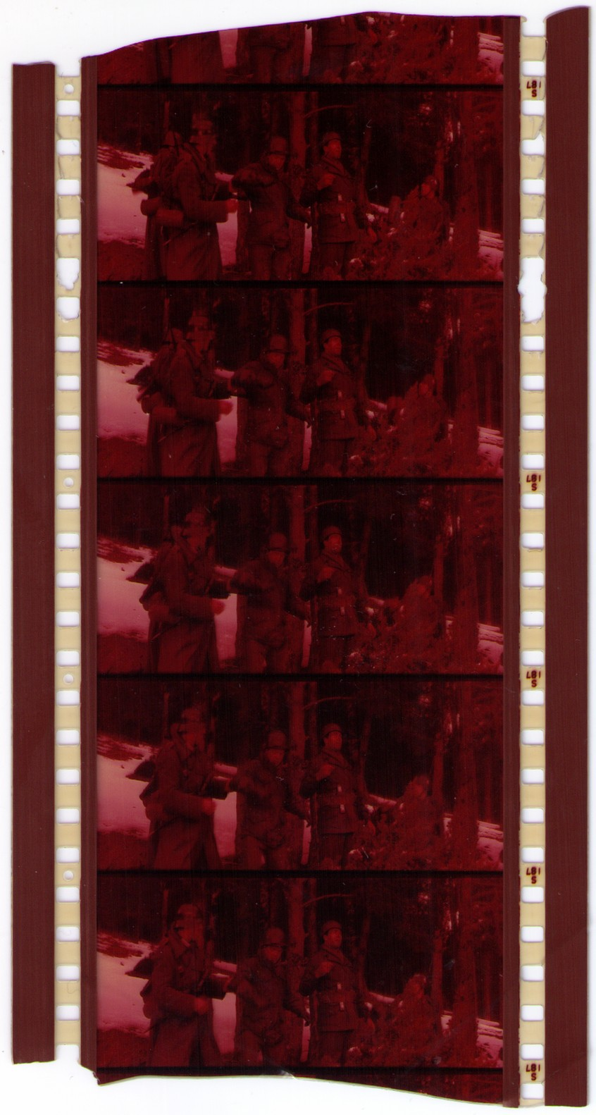 70 mm-Film mit Magnettonspuren